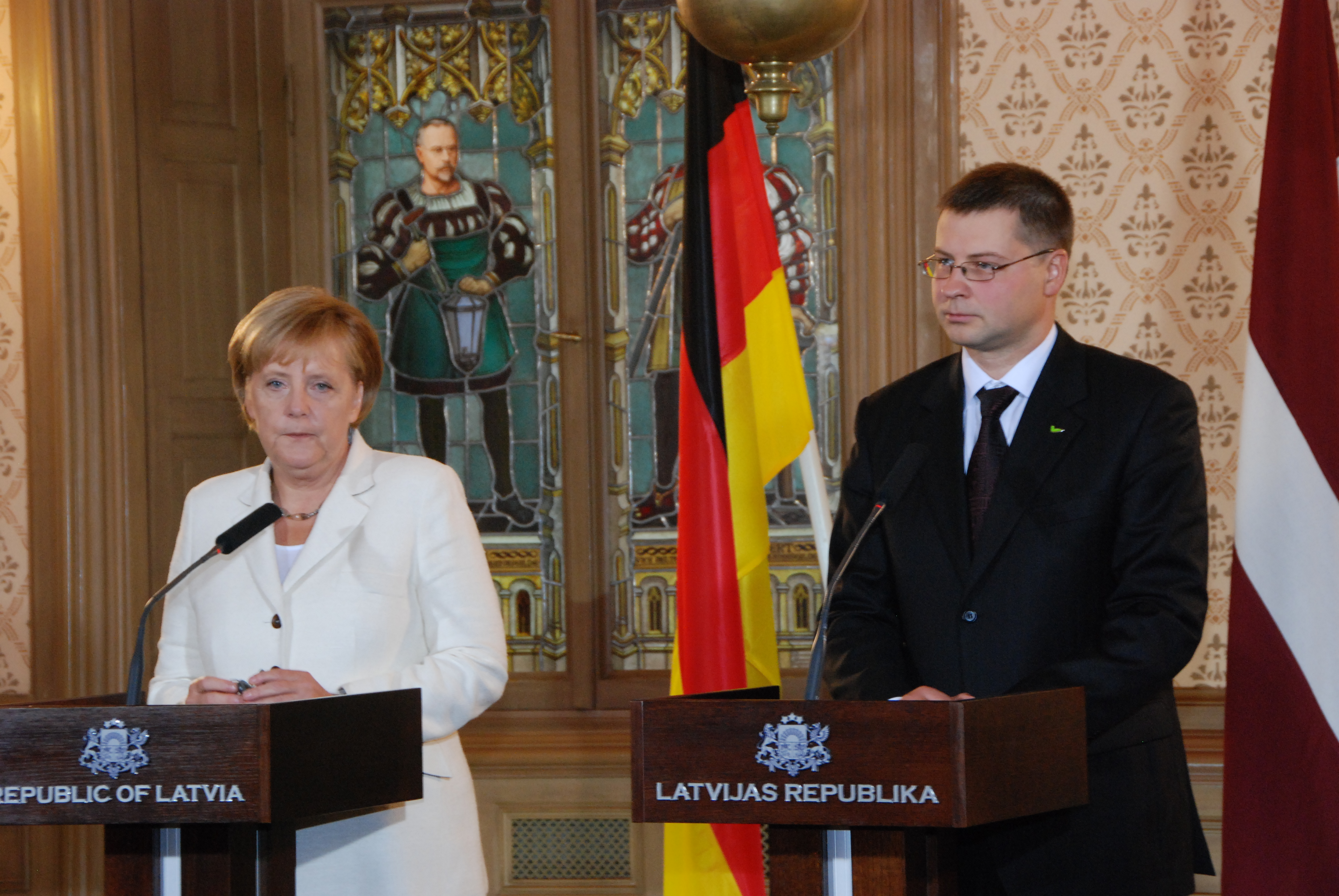 Ministru prezidenta Valda Dombrovska un Vācijas kancleres Angelas Merkeles preses konference Foto: Aivis Freidenfelds, Valsts kanceleja